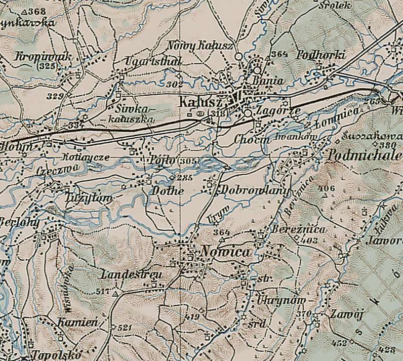 Kałusz, austriacka prowincja Galicja, old map from 1889